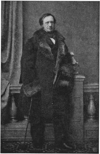 Peter Andreas Munch fotografert i 1862.